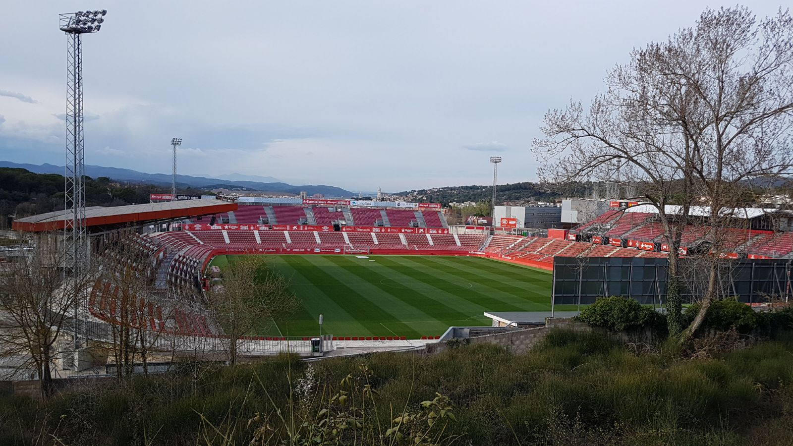 panoramica estadio montilivi aspecto el 28/06/11